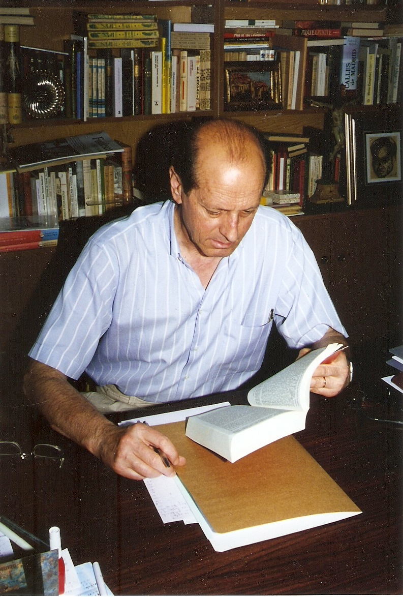 Antonio L. Bouza fotografiado en su estudio, 1996.